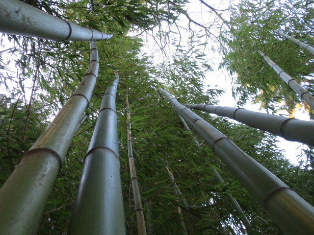 bambous geant au jardin jungle 2